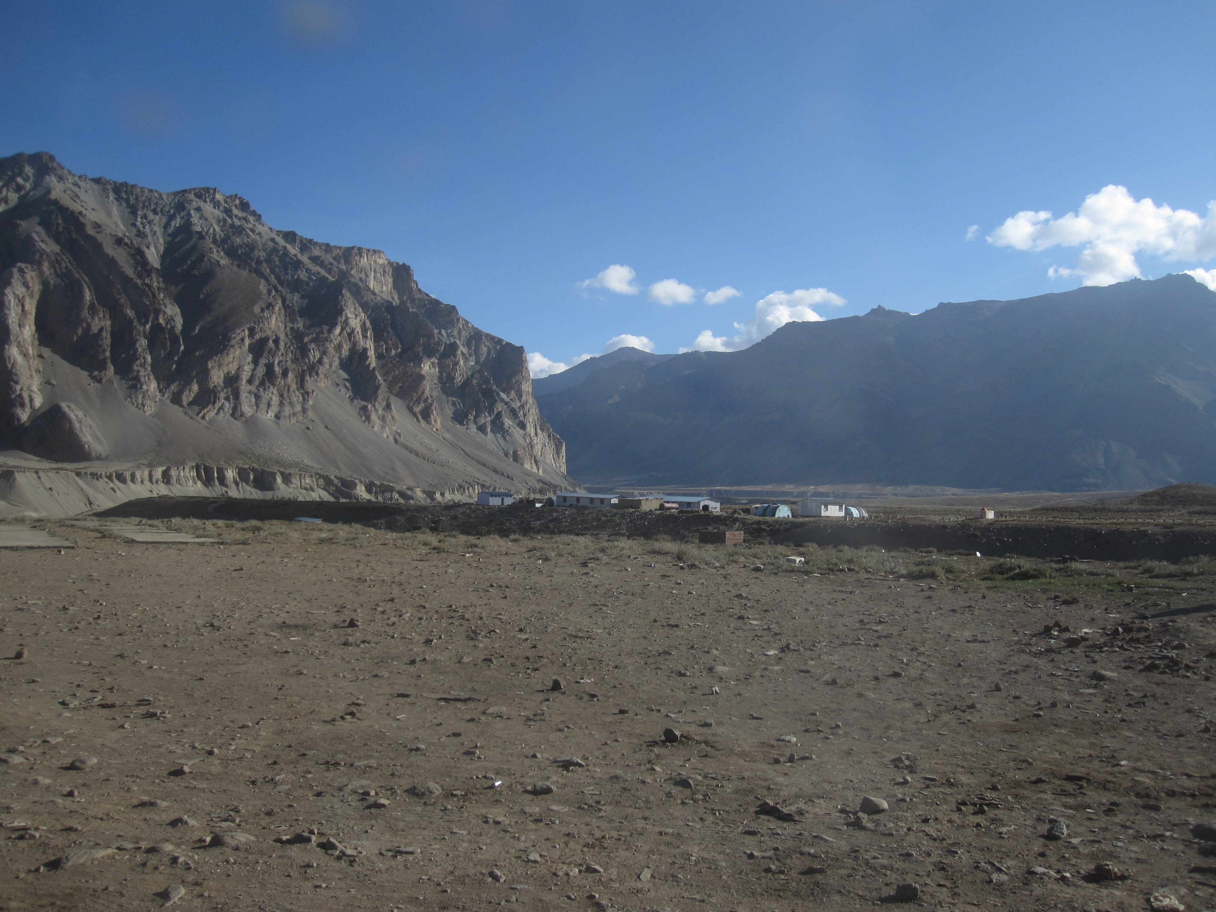 Sarchu, Ladakh, Jammu & Kashmir, India